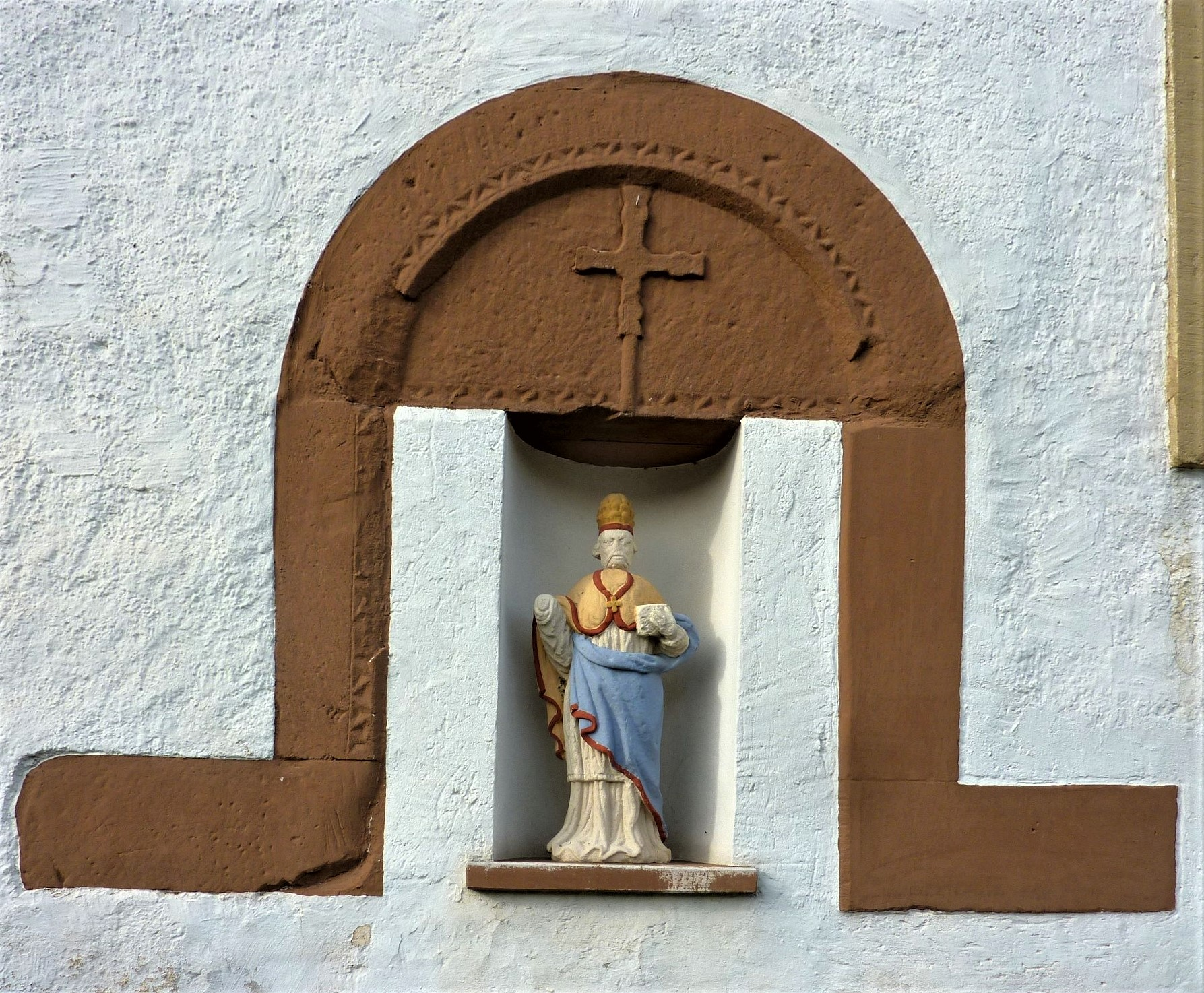 St.Clemens (Olk)